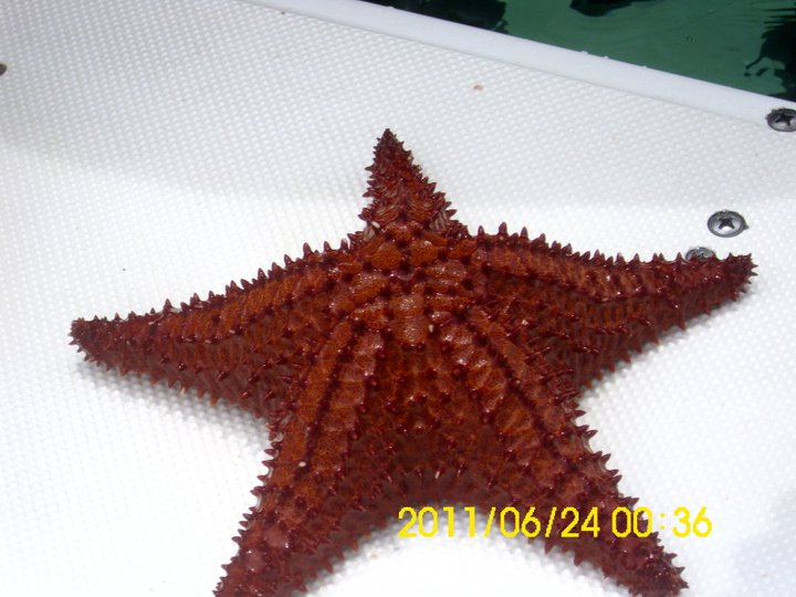 Oreaster reticulatus enarchpielago Los Roques - Venezuela